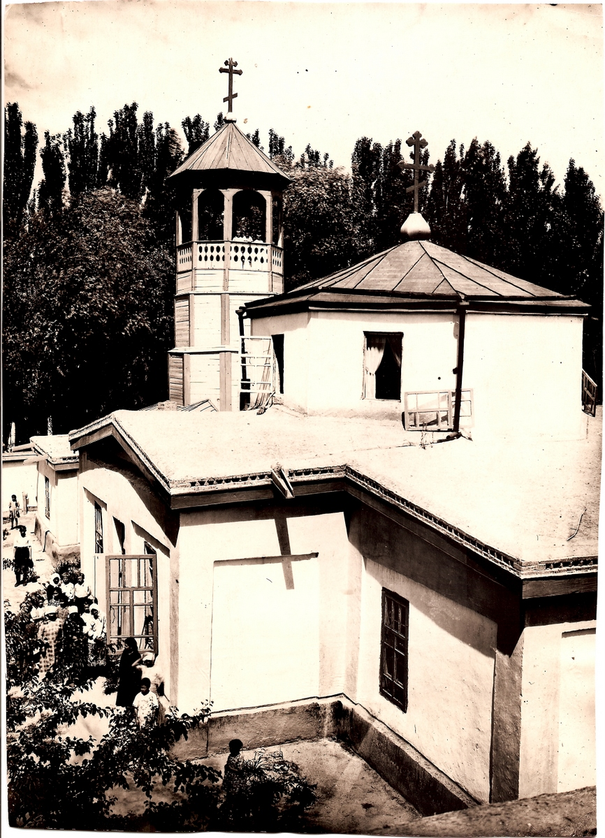 Храма святителя Николая в Кульдже